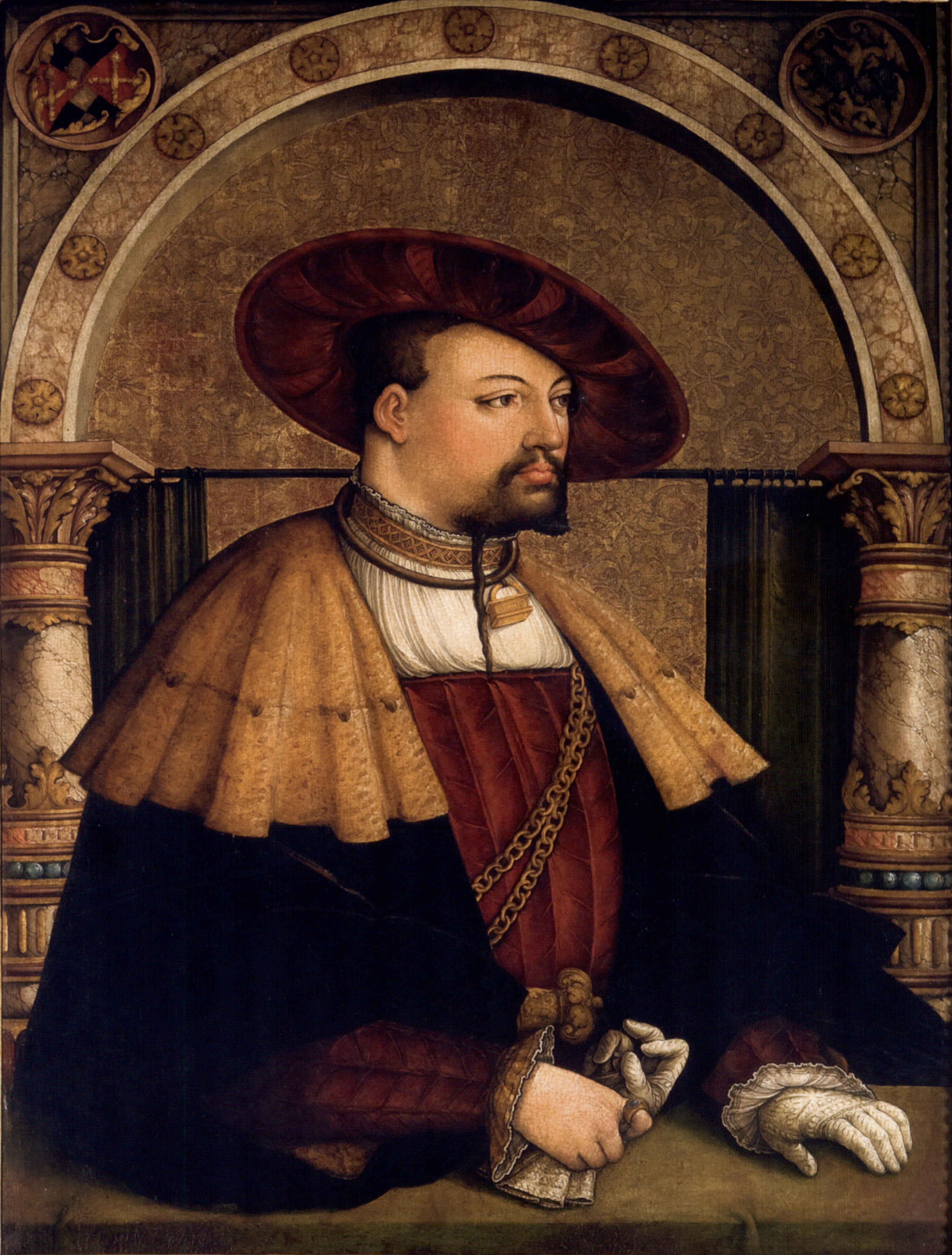 Portrait Eitelfriedrich III. von Zollern, 1561, nach einer Vorlage von 1520; Fürstlich Hohenzollernsche Sammlungen, Sigmaringen